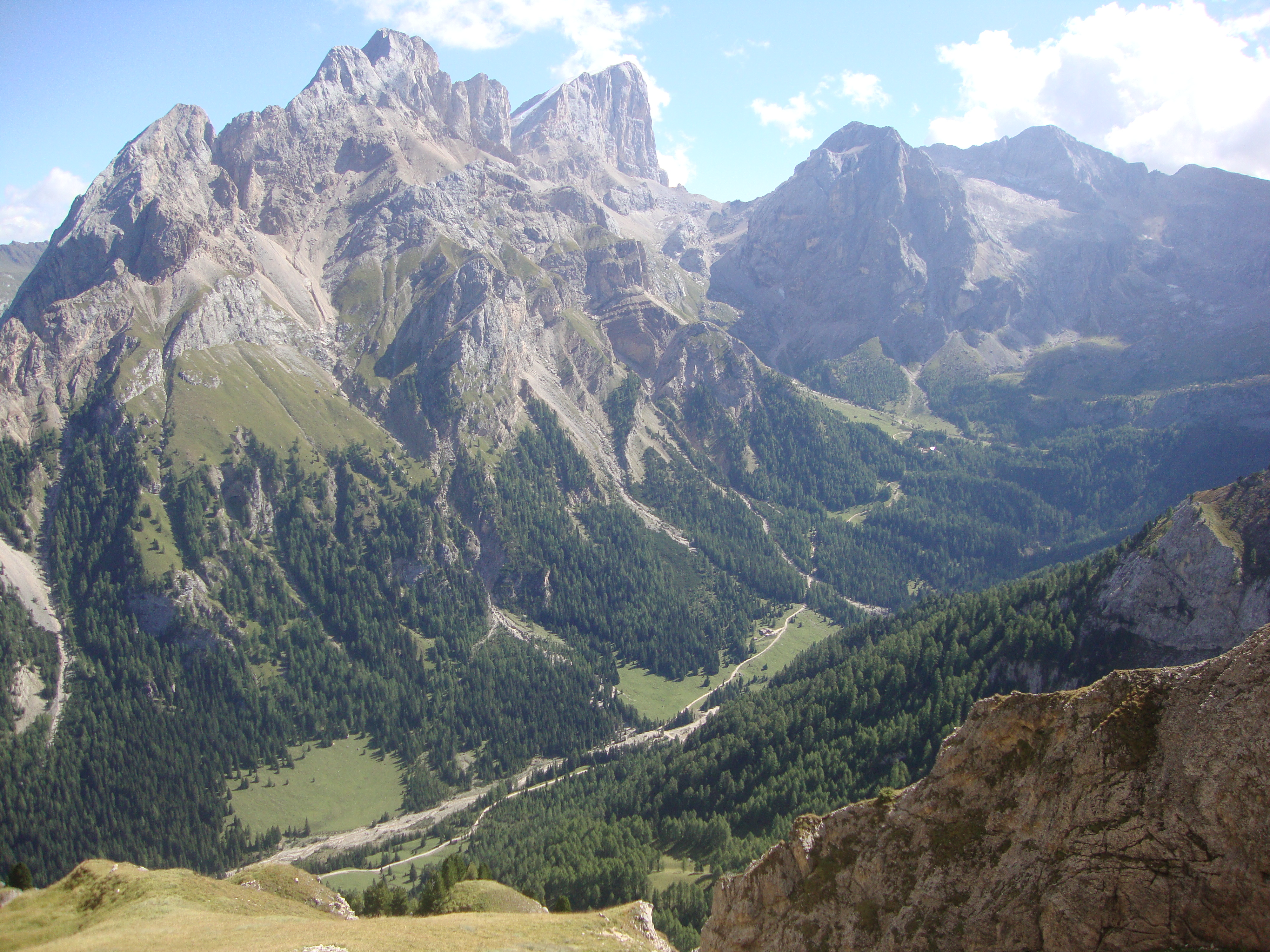 Colac versante est ,vista sulla val Contrin e la mitica parete sud